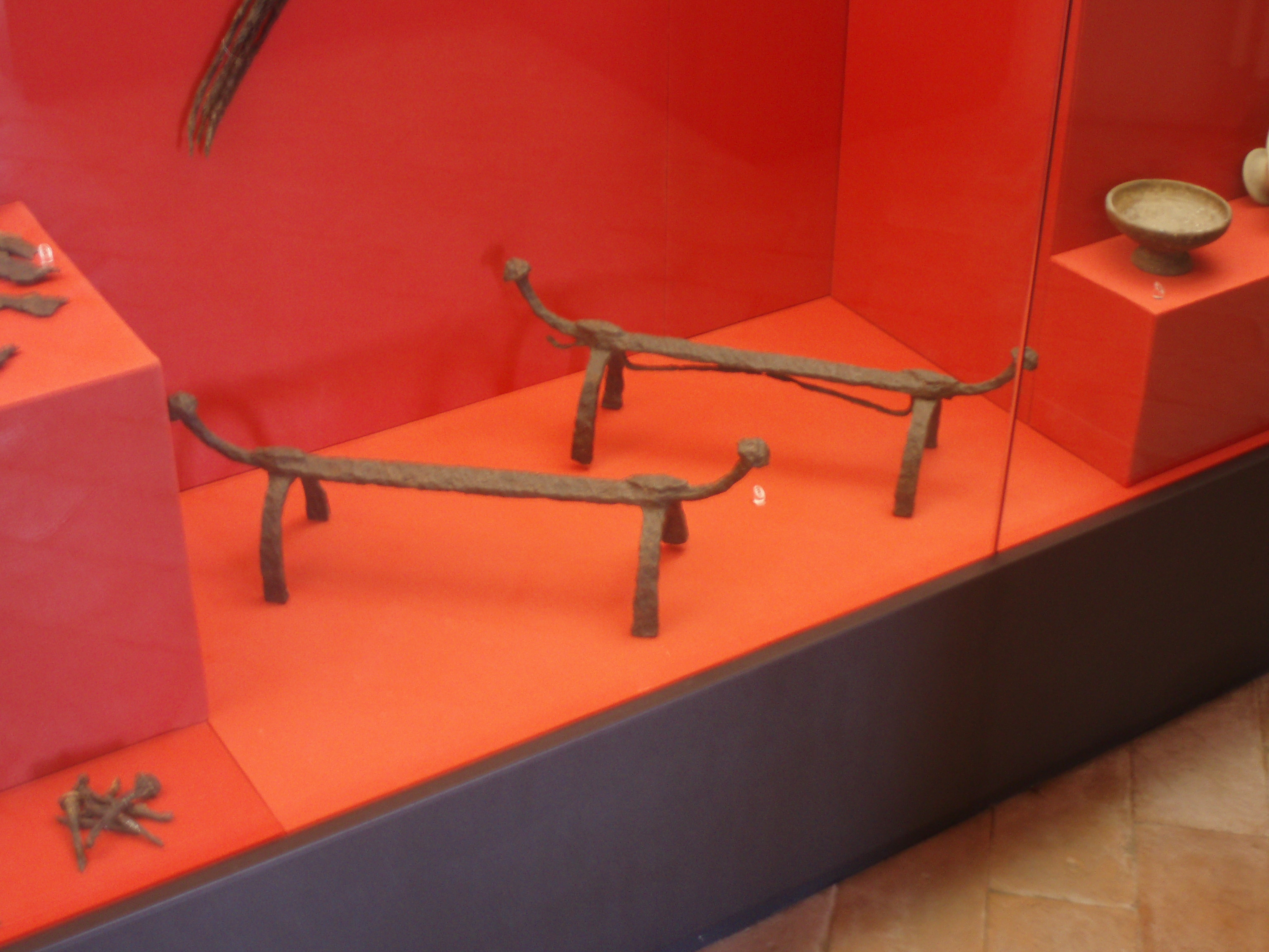 Alari gallici, Museo archeologico statale di Arcevia - 2